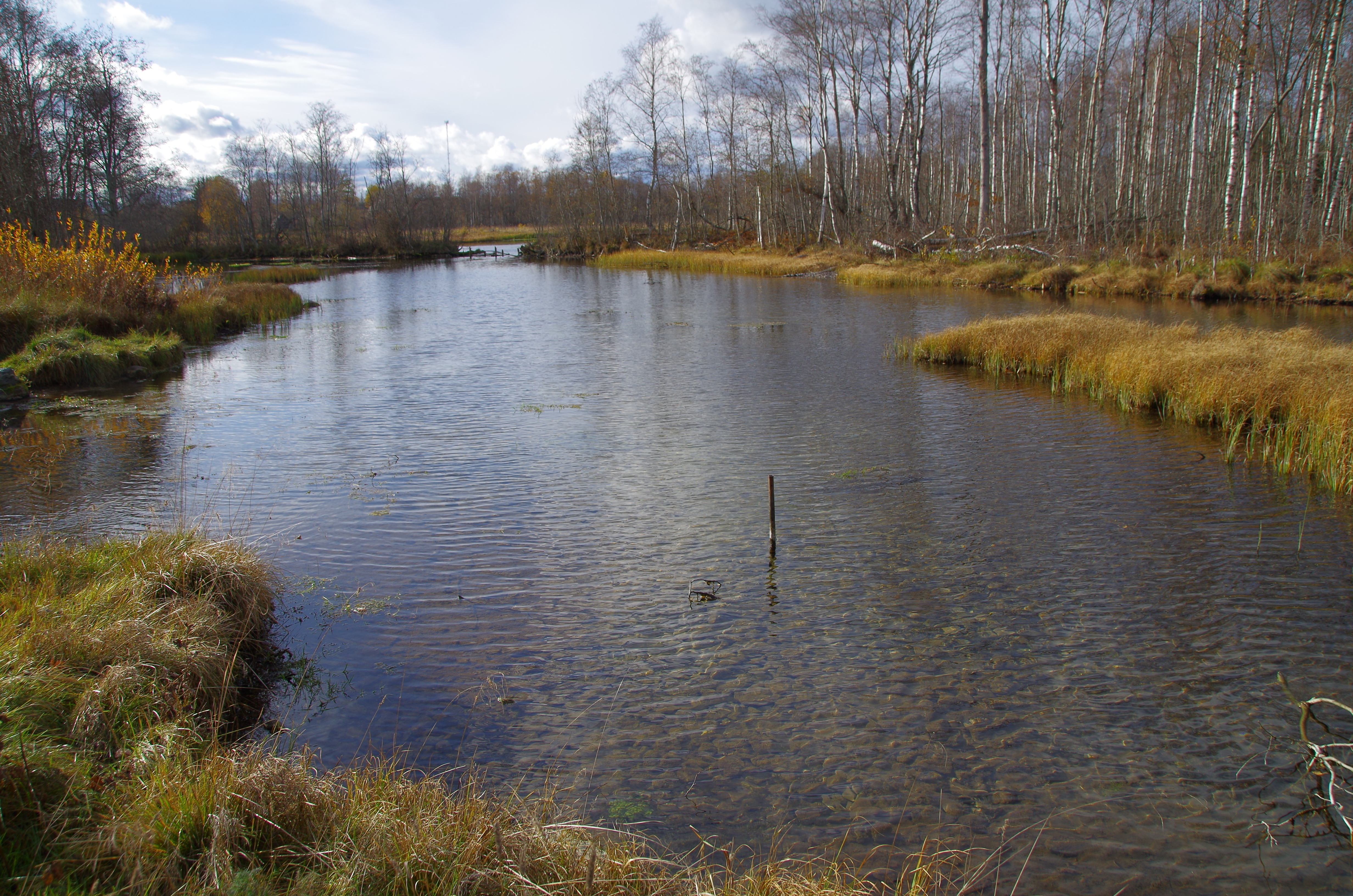 Konnavere allikad on kaitstavad allikad Lääne-Viru maakonnas Tapa vallas Valgejõe oru parempoolsel nõlval. Oru nõlval on u 50 m pikkune lõik, kus on tõusu- ja langeallikaid.